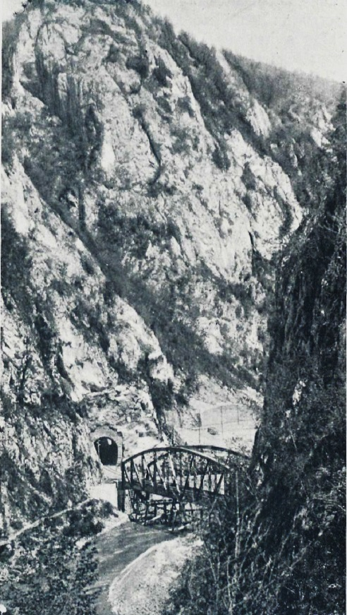 Bei km 67,2 führte die Trasse der Bosnischen Ostbahn mit einer 50 m langen Brücke über die Prača und in den Tunnel Nr. 44.